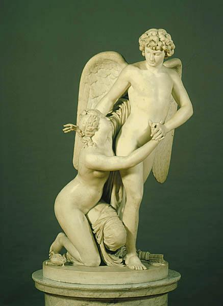 Amor och Psyke, 1787, Johan Tobias Sergel (1740-1814)